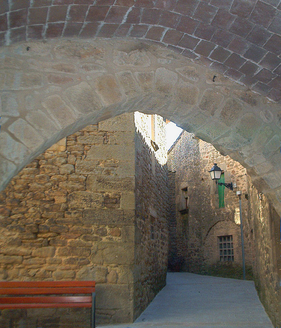 Als pobles de l'interior de Catalunya hi trobem centenars de carrers que passen per un arc sota les cases (Su, Riner, Solsonès)